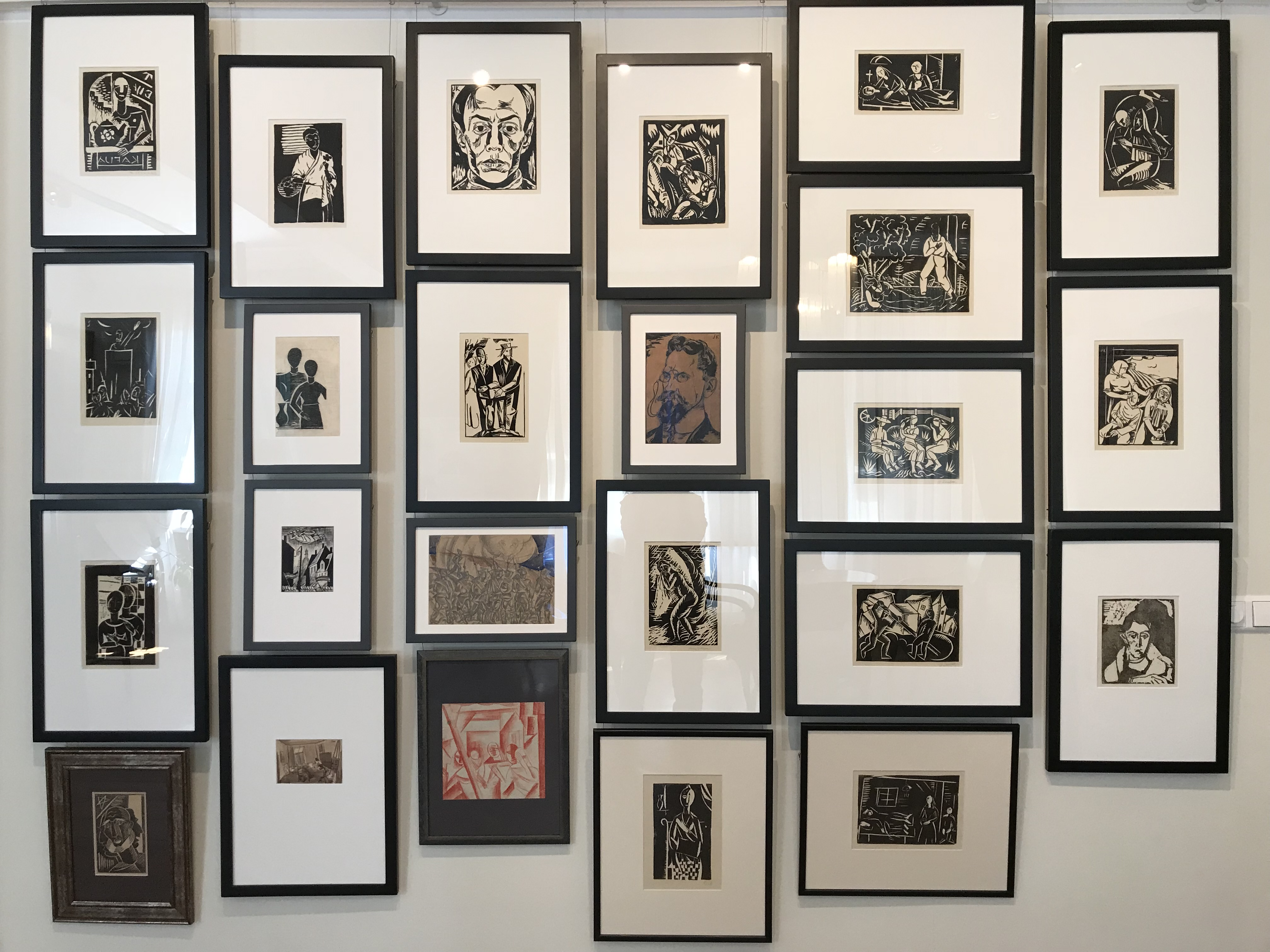 Romans Sutas och Aleksandra Beļcovas museum i Riga, grafik.